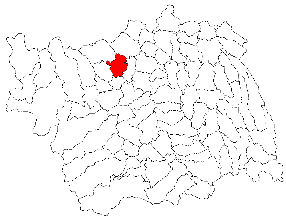 Categorie:Hărţi ale judeţului Bacău